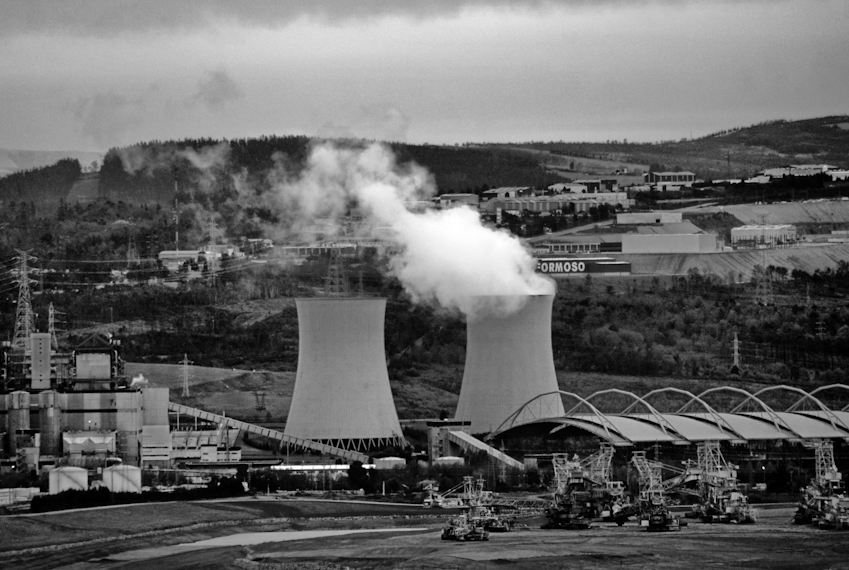 Central térmica das Pontes de García Rodríguez